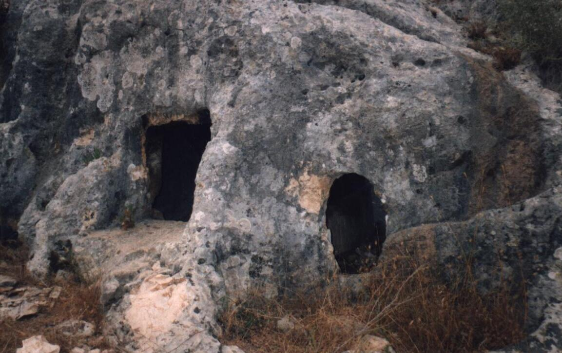 الخشاخيش - إحدى المدافن القديمة في بلدة عبا